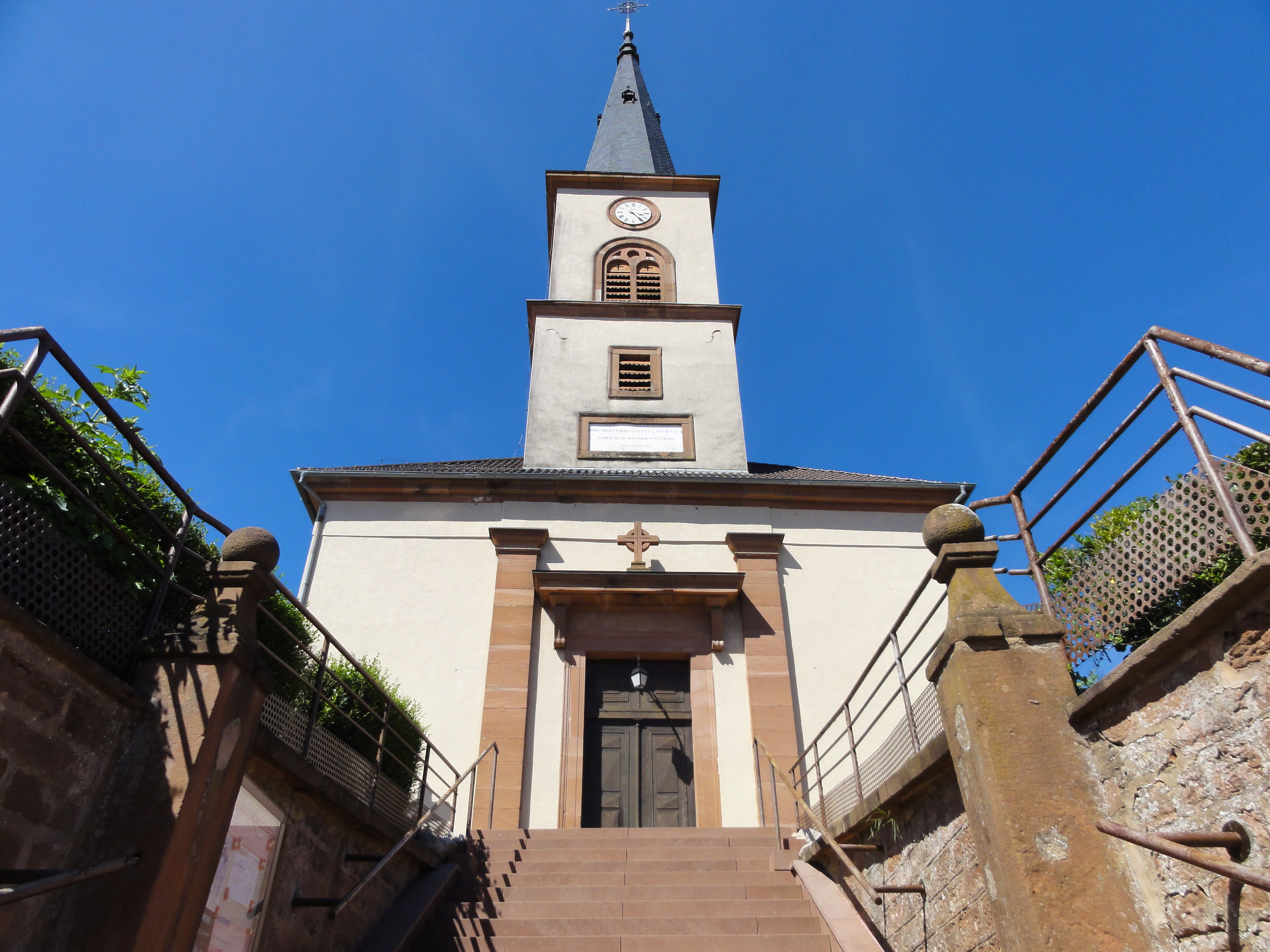 Alsace, Bas-Rhin, Morschwiller, Église Saint-Étienne (IA00061699).